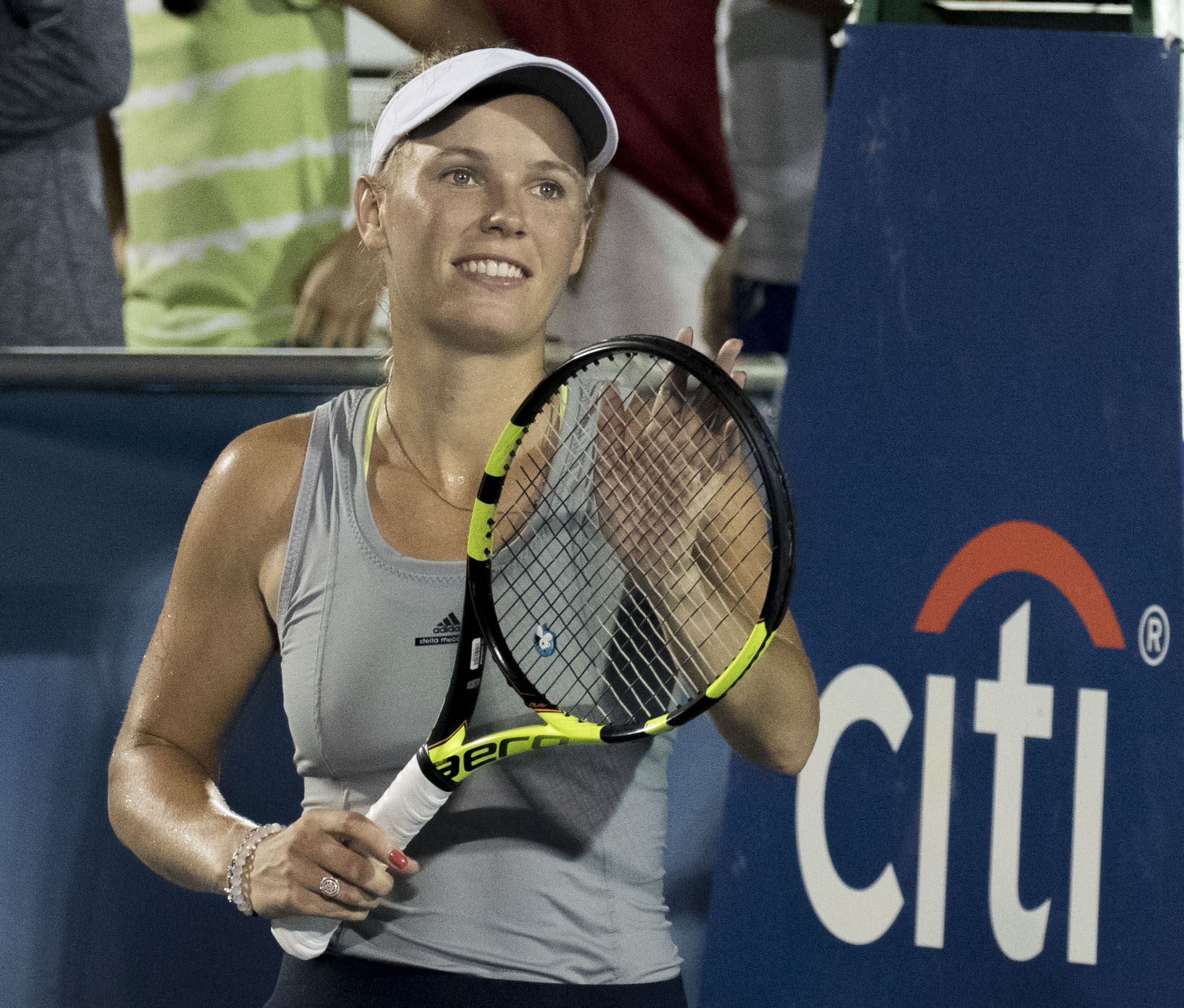 2016 Citi Open